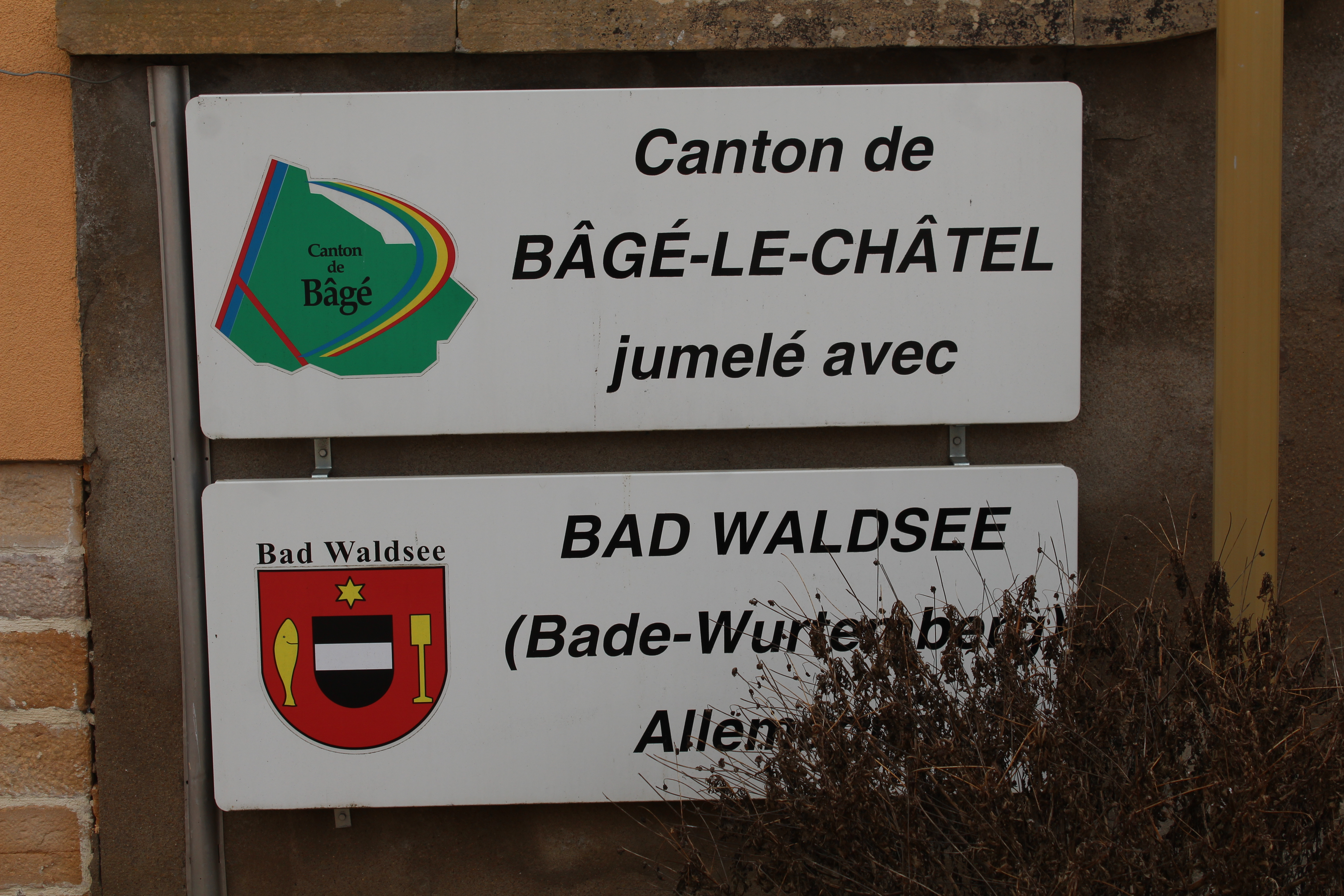 Panneau de jumelage entre le canton de Bâgé-le-Châtel et Bad Waldsee vers la mairie d'Asnières-sur-Saône.